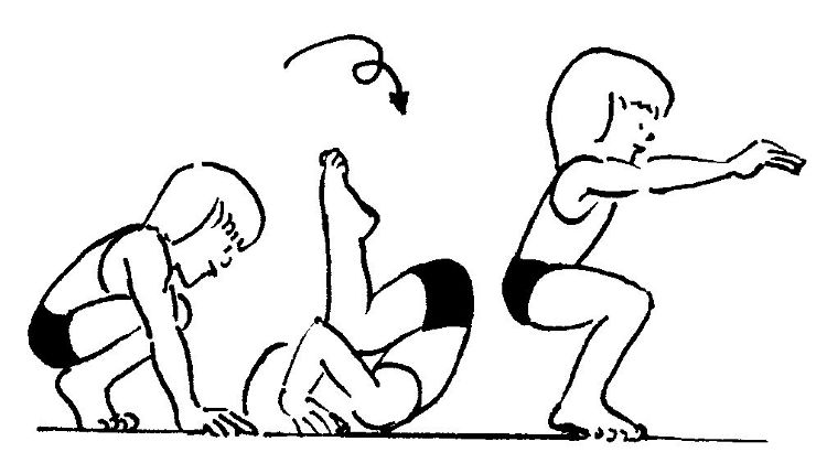 koprol